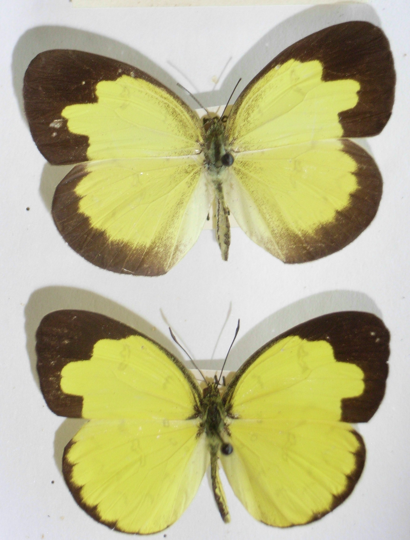 Eurema andersonii